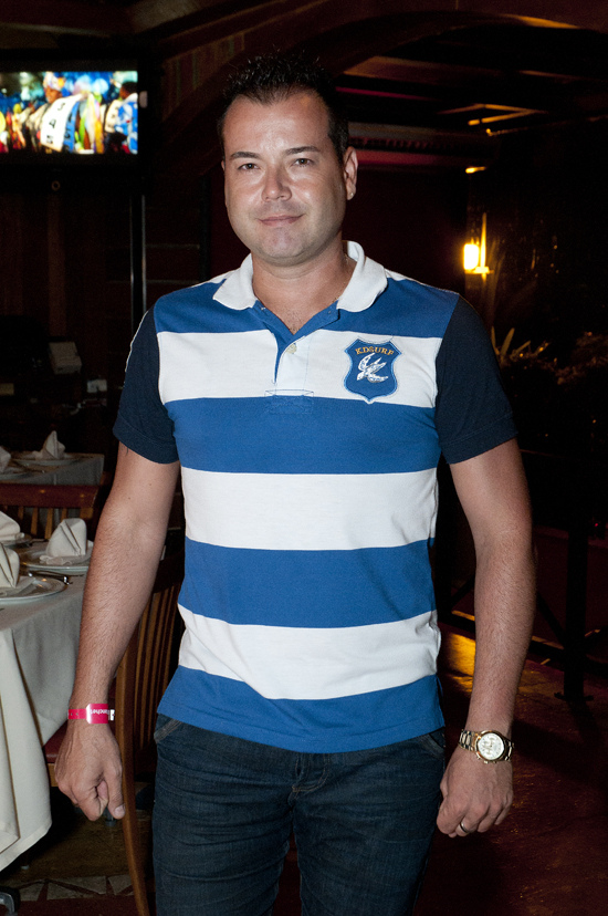 Festa de entrega do Troféu Rádio Manchete 2011. Foto: Ricardo Almeida.